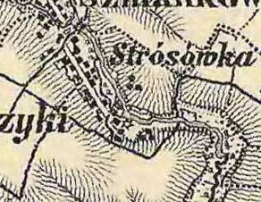 XIX ст.